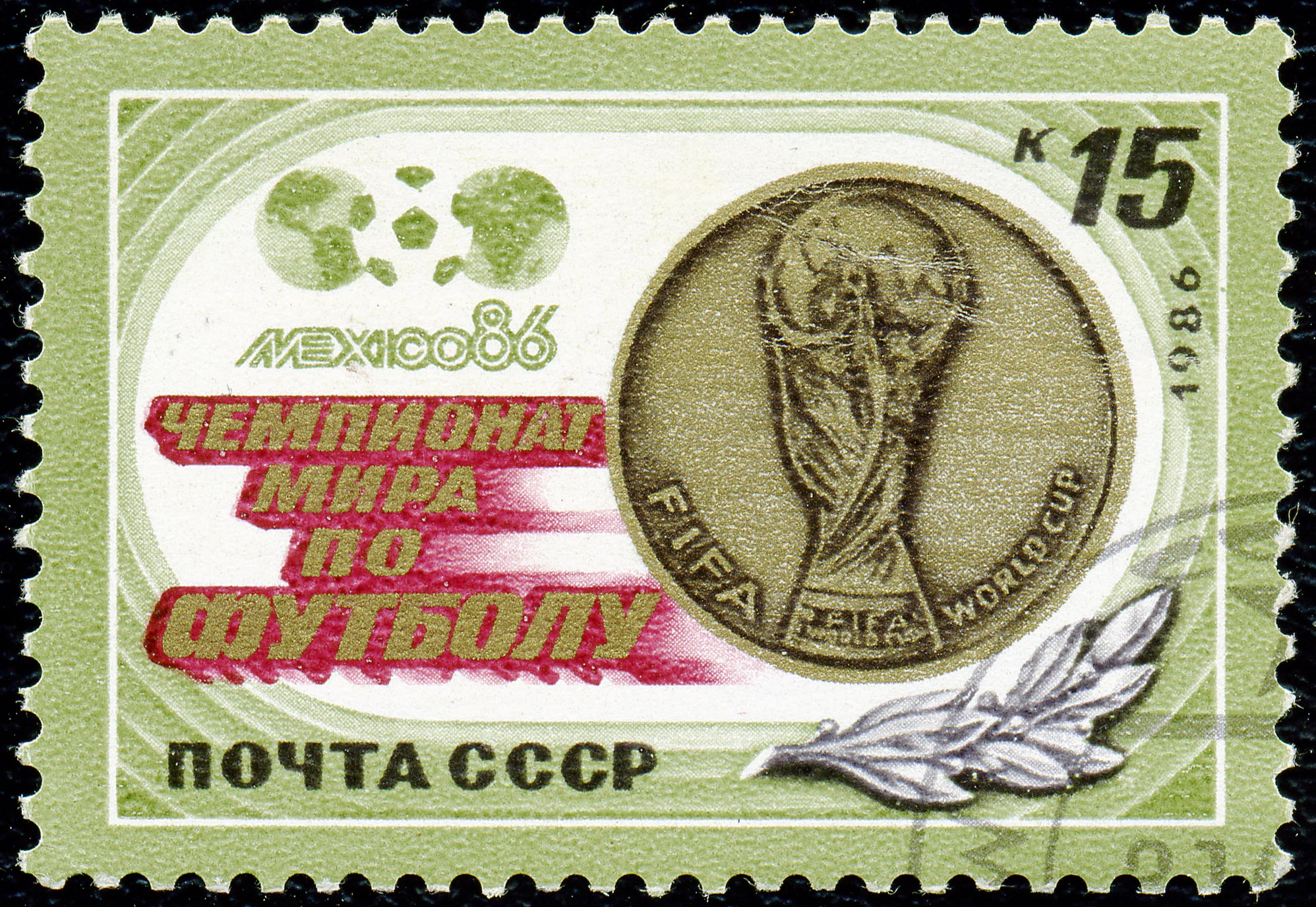 Почтовая марка СССР. 1986. Чемпионат мира по футболу